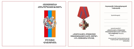 «Հայրենիքին մատուցած ծառայությունների համար» 1-ին աստիճանի մեդալի վկայական